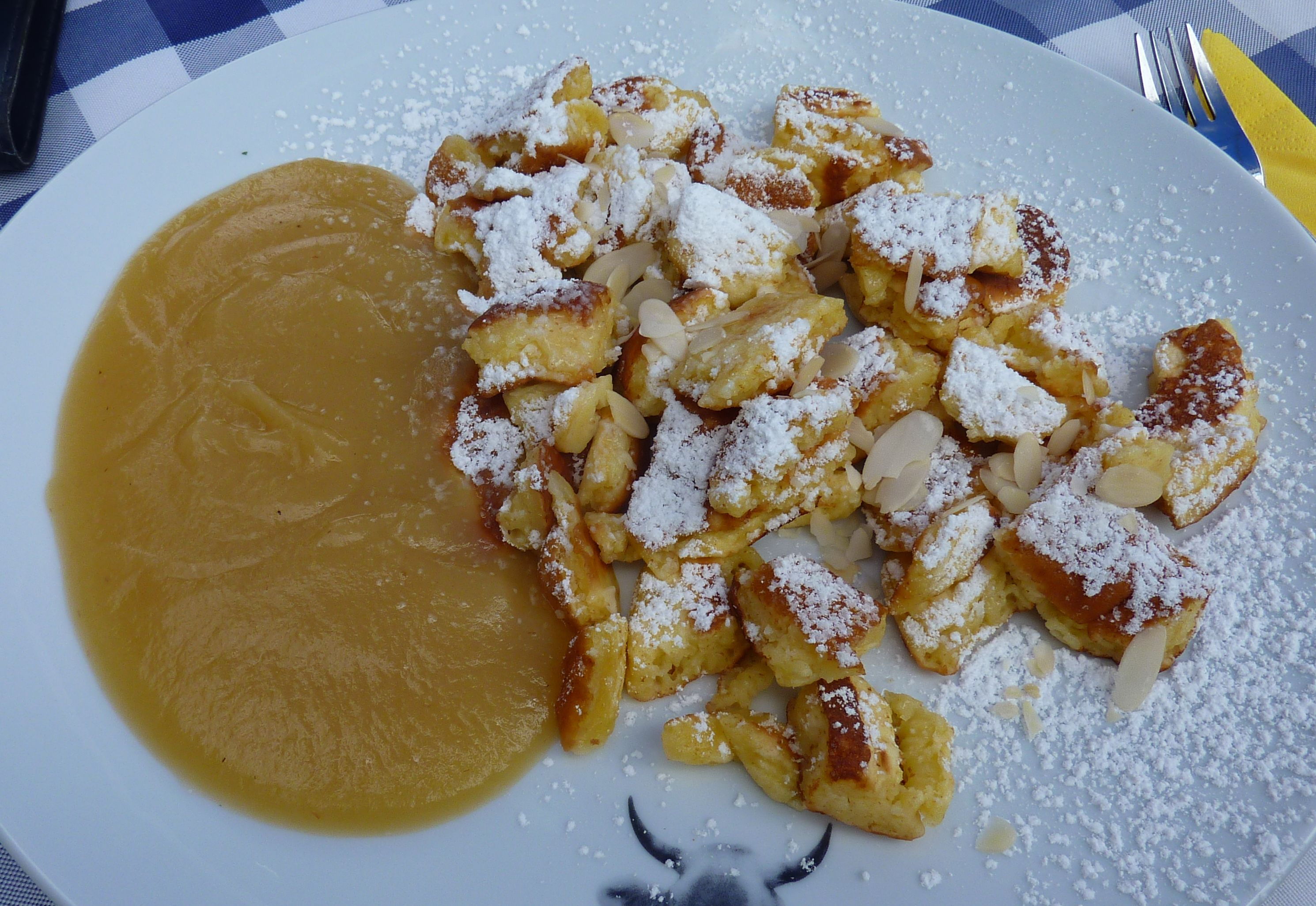 Kaiserschmarrn mit Apfelmus